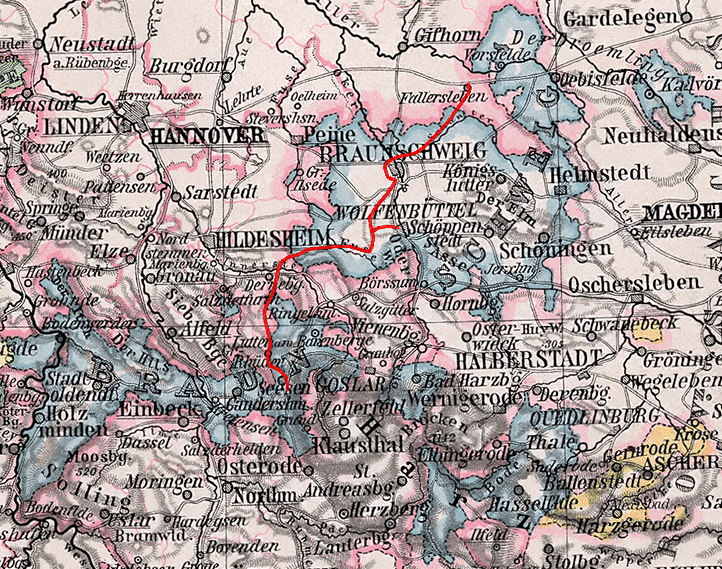 Karte der Braunschweigische Landes-Eisenbahn-Gesellschaft